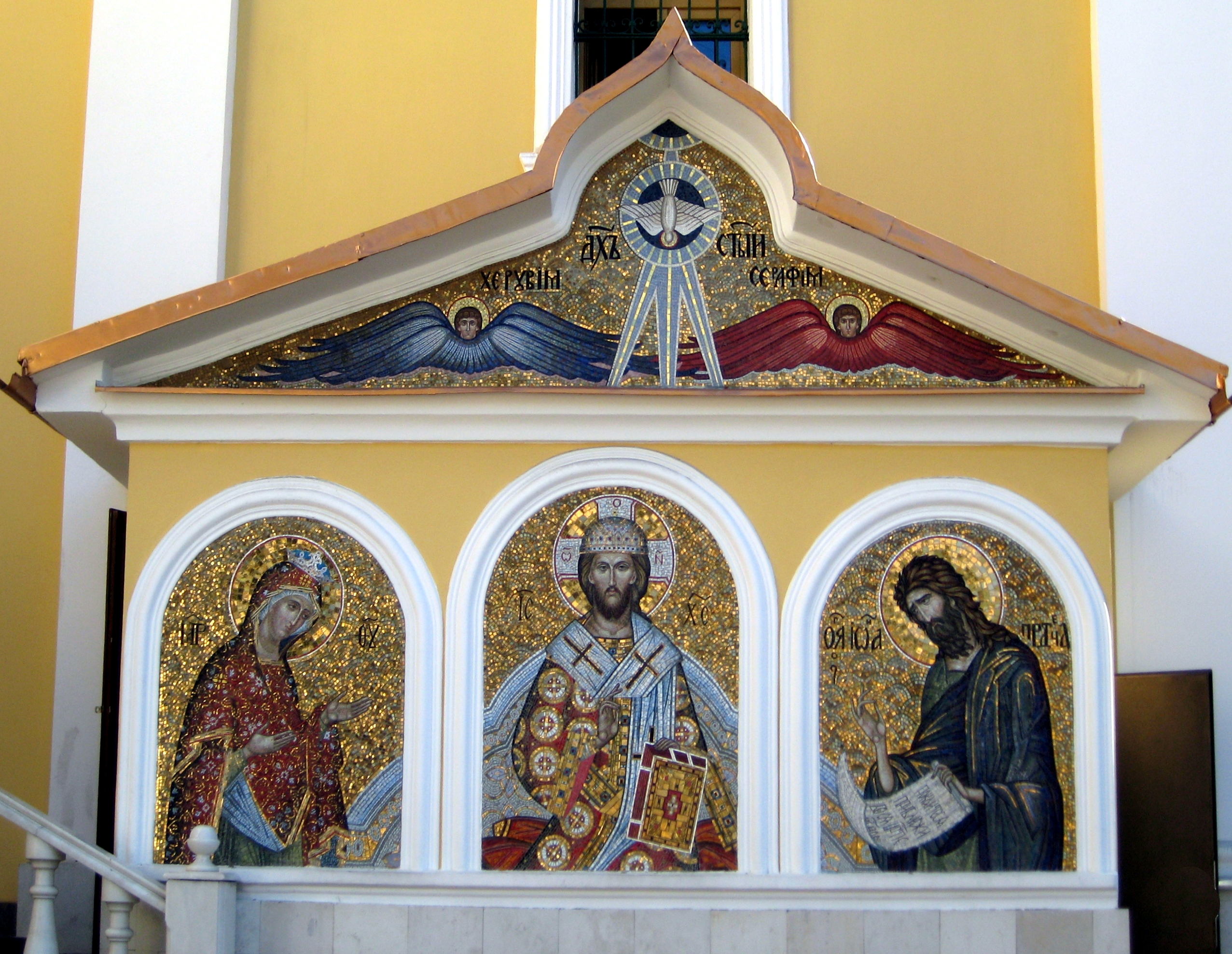 Храм Всех Святых во Всехсвятском, метро Сокол. Мозаика Деисус